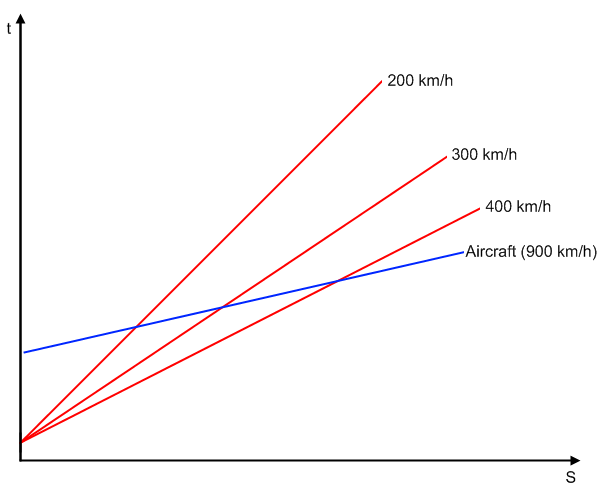 Сопоставление графиков зависимости времени от расстояния для разных скоростей движения поездов (красные линии), и сравнение с самолётом (синяя линия)